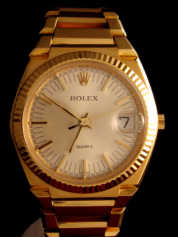 Rolex Quartz Date Ref 5100